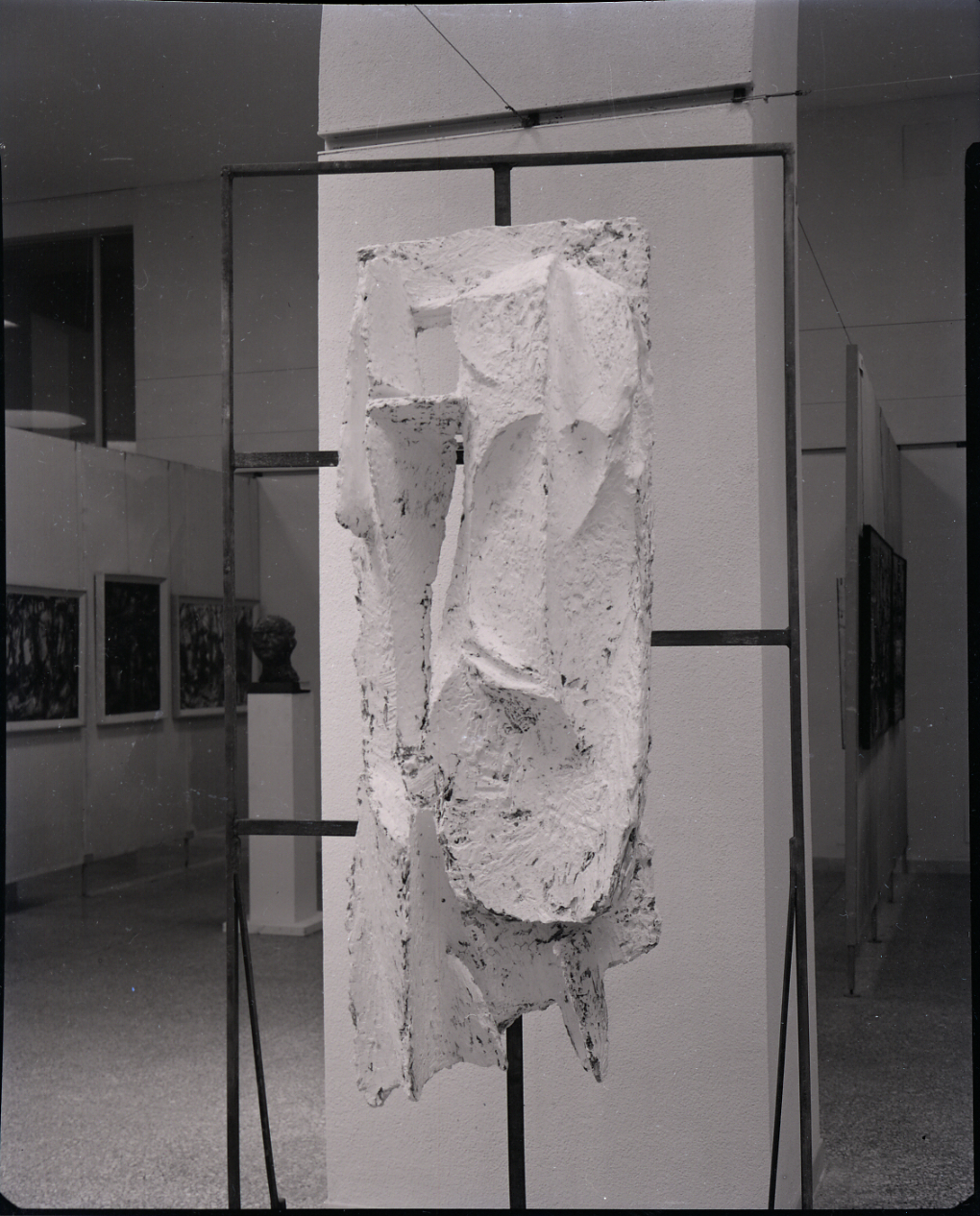 Servizio fotografico : Italia, 1959 / Paolo Monti. - Buste: 5, Fototipi: 10 : Negativo b/n, gelatina bromuro d'argento/ pellicola ; 10x12. - ((Serie costituita da 10 negativi identificati con i nn.: 20364-20373. Sulla busta G20364/65 manoscritto: "Cassanii". La suddetta serie è contenuta nella scatola identificata con la numerazione 20336-20373. Sulla scatola manoscritto con pennarello nero: "Arch. Pellini". La scatola è a sua volta contenuta in una scatola grande col coperchio giallo. - Fonte: Rubrica di Paolo Monti: s.t. [Soggetti e committenti] (1956-1961), presso Archivio Paolo Monti